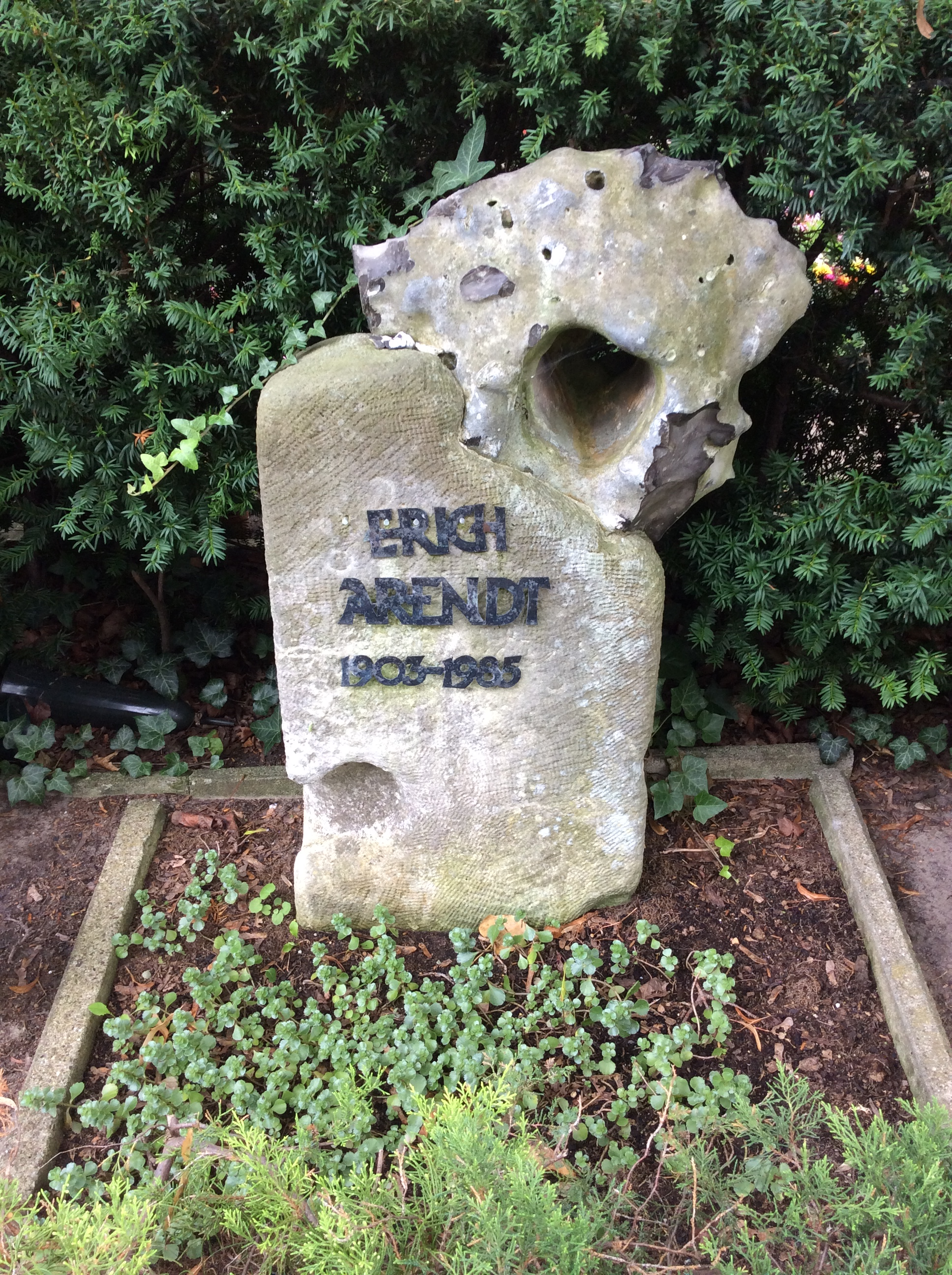 Grabstein von Erich Arendt auf dem Dorotheenstädtischen Friedhof in Berlin-Mitte, August 2016